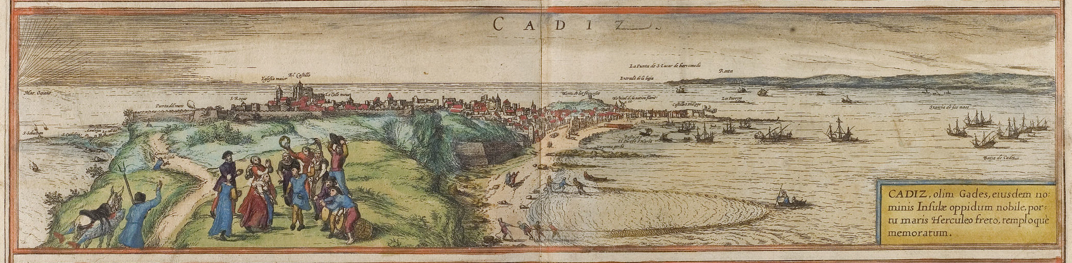 Cadiz